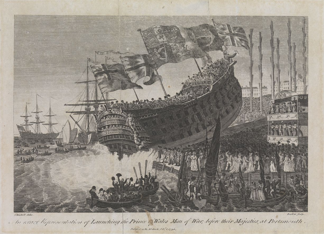 Спуск на воду HMS Prince of Wales 28 июня 1794 года в Портсмуте.